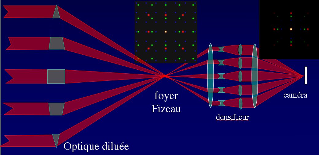 Principe de l'hypertélescope.Une optique focalisante diluée, représentée ici sous forme d'une lentille segmentée mais qui peut en pratique être un miroir concave géant formé de petits segments éloignés les uns des autres, forme une image d'une source ponctuelle dans son plan focal.Cette « image interféromètrique de Fizeau » possède un pic central blanc entouré de nombreux pics secondaires , remplissant le large halo de diffraction des sous-ouvertures. En reprenant l'image à travers un densifieur de pupille (à droite), le halo est retrécie le pic central s'en trouve fortement intensifié car l'énergie totale est conservée. Le densifieur comporte une série de petites lunettes de Galilée inversées qui élargissent les éléments de la surface d'onde. Vue du detecteur, la pupille n'est plus diluée mais pleine.Un second point source, décalé hors de l'axe optique, donne un pic identique décalé si l'espacement est faible. Une image directe d'objects compacts est ainsi obtenue. Le dessin montre une ouverture périodique, mais la disposition des éléments peut être quelconque, auquel cas les pics secondaires de l'image Fizeau sont remplacés par des speckles ou tavelures.